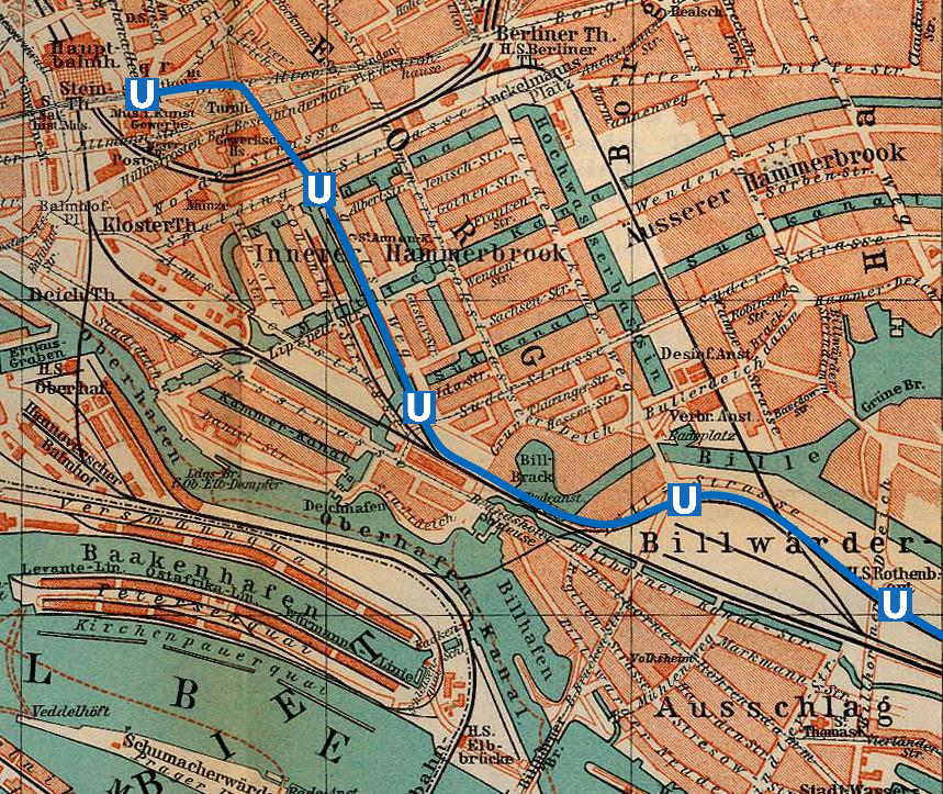 ehemalige Zweiglinie nach Rothenburgsort (Hamburg) auf einer Karte von 1910